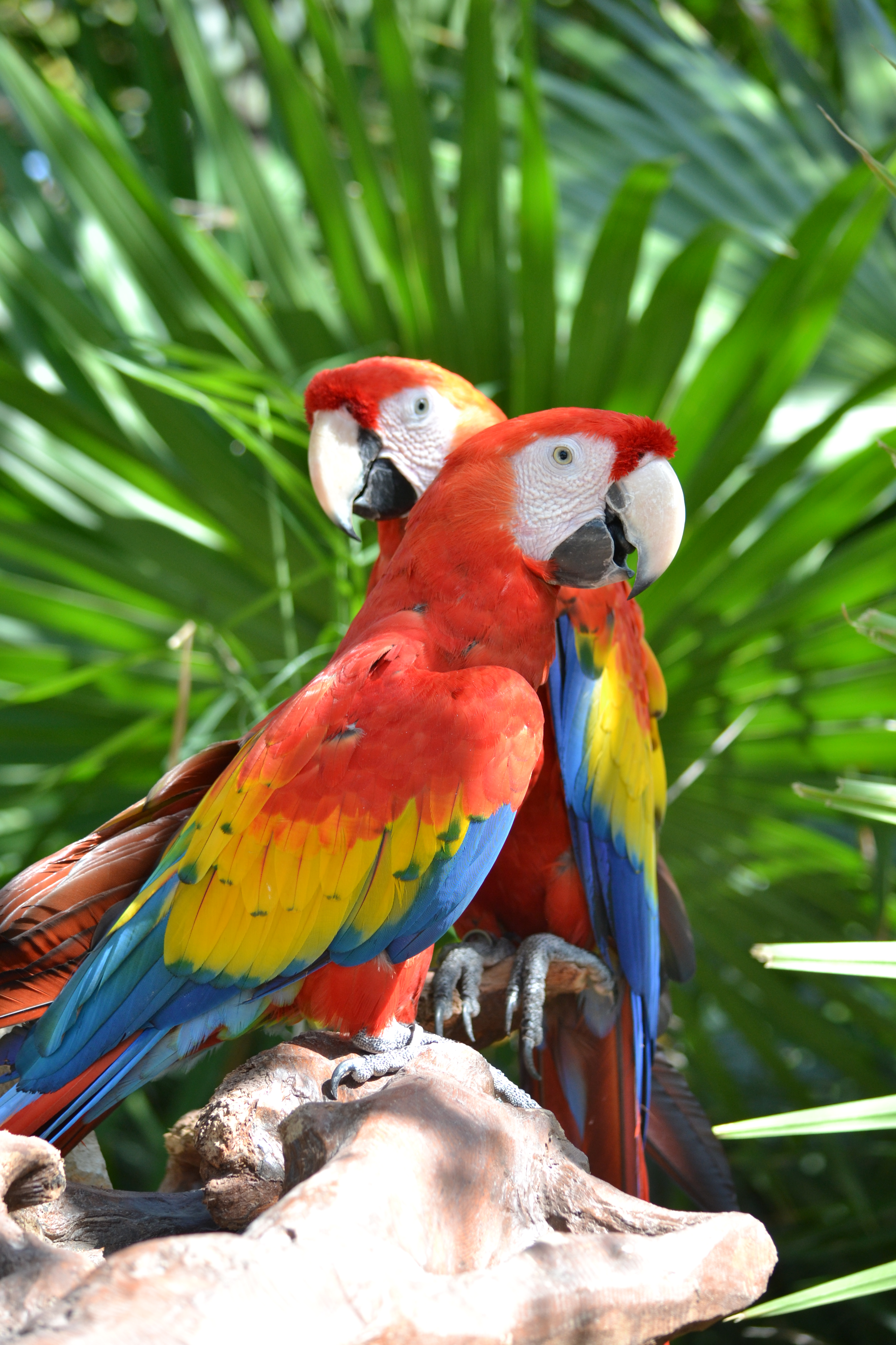 Guacamayas rojas (Ara macao) en el zoológico de Xcaret en Cancún, México.